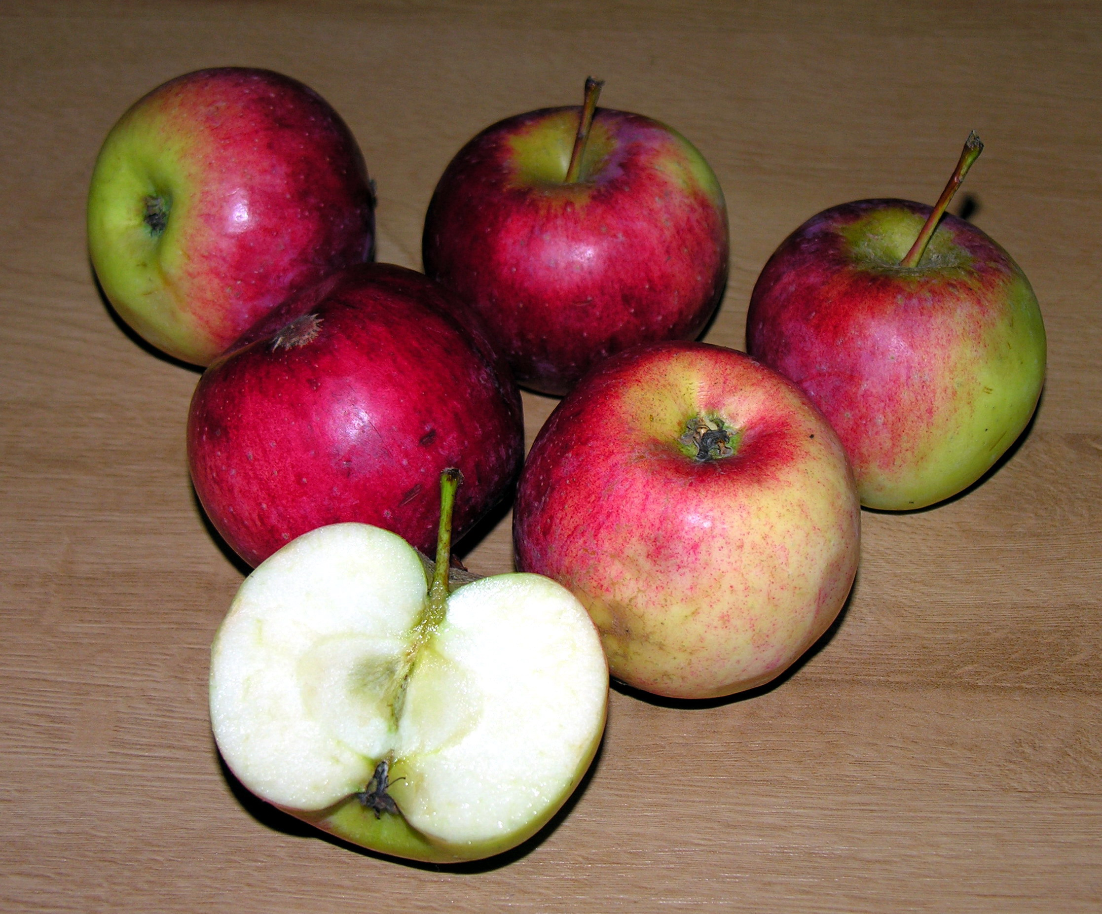 Noris 2007 m. vasario 19 d., Lietuva